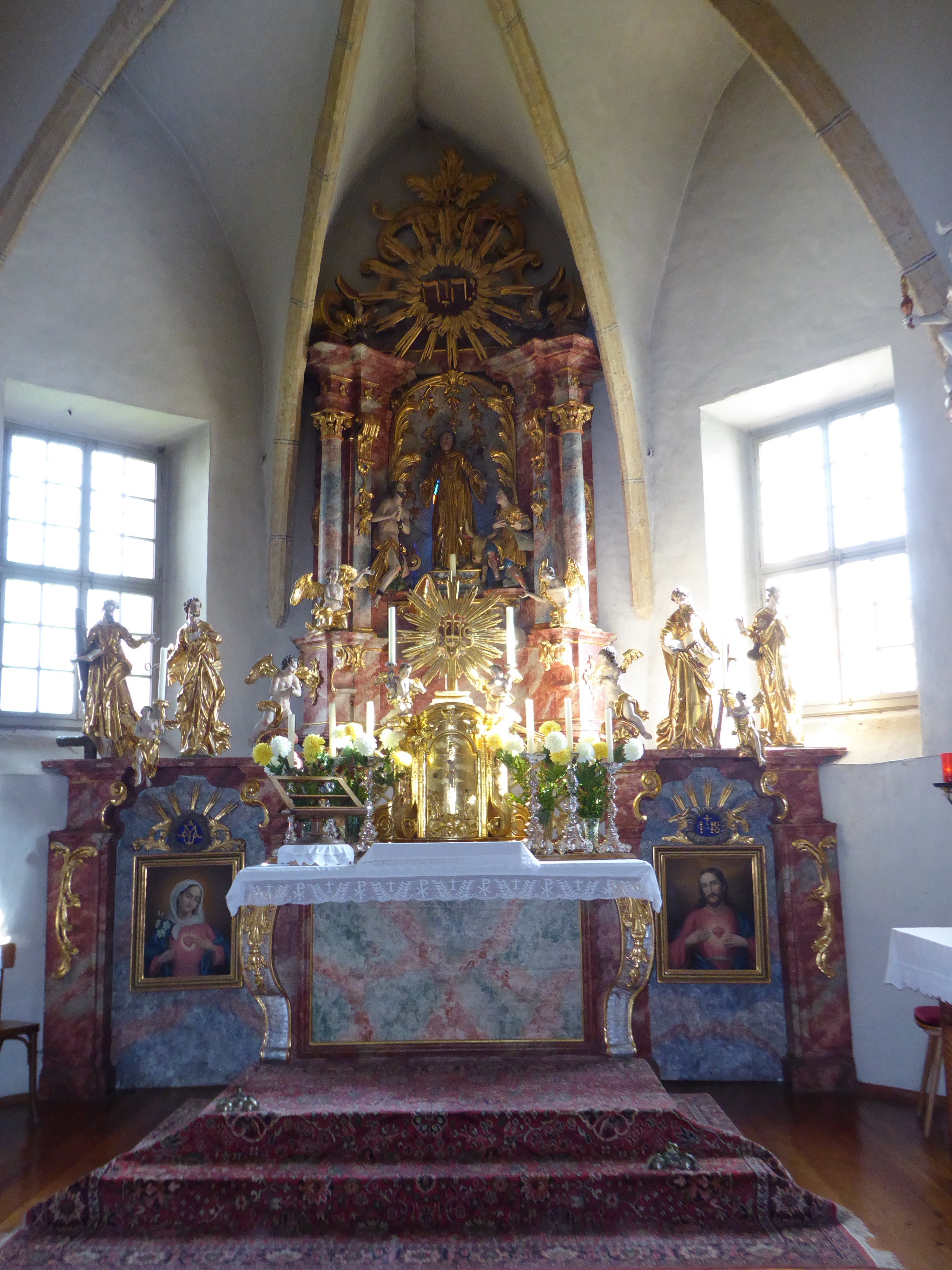 Pfarrkirche hl. Leonhard, bei Sankt Marein bei Neumarkt 50 (Pöllau), Steiermark, Österreich